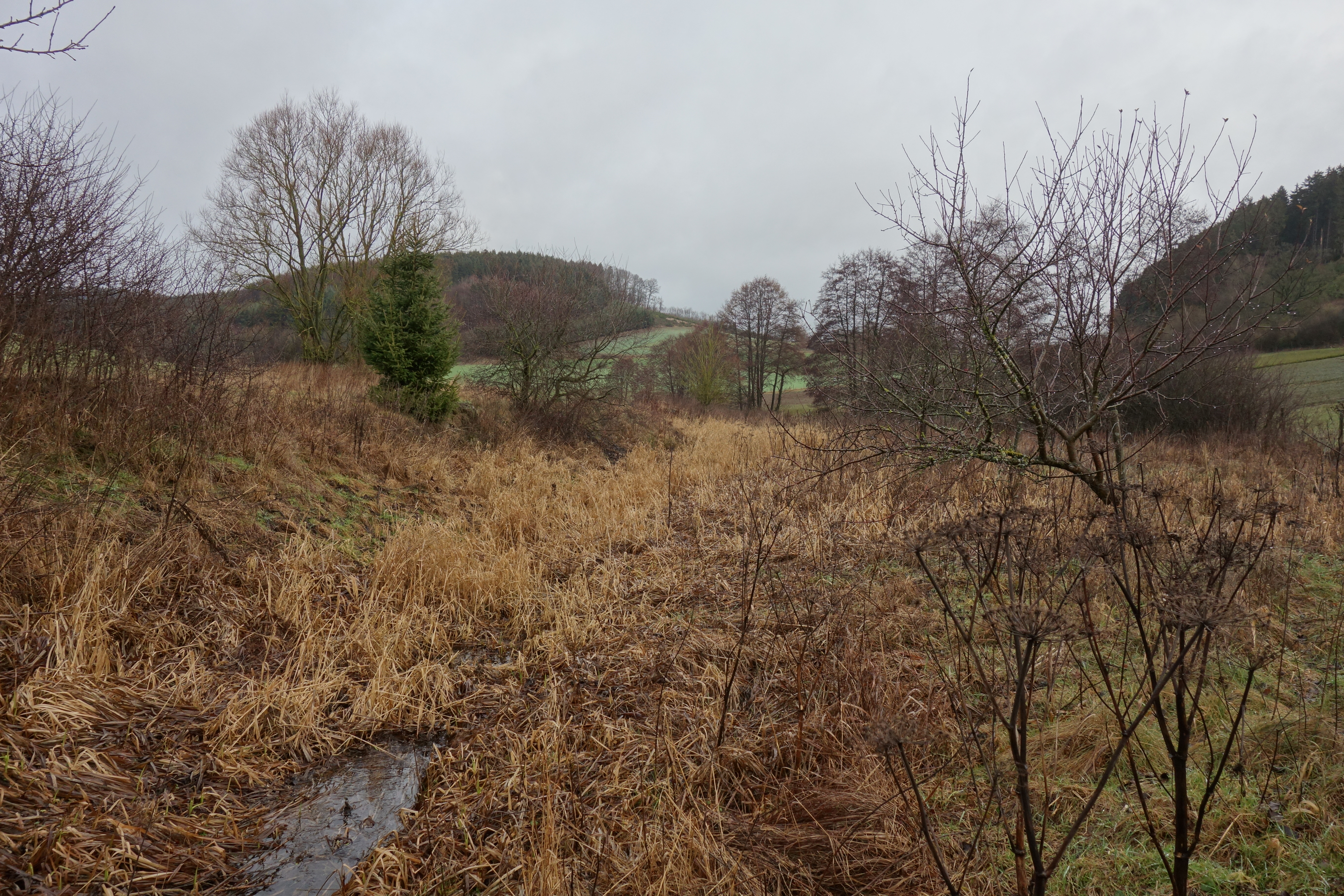 Naturschutzgebiet Feuchtgrünland am Hengsbecker Bach. Foto von Mitte des NSG in Richtung Norden aufgenommen.